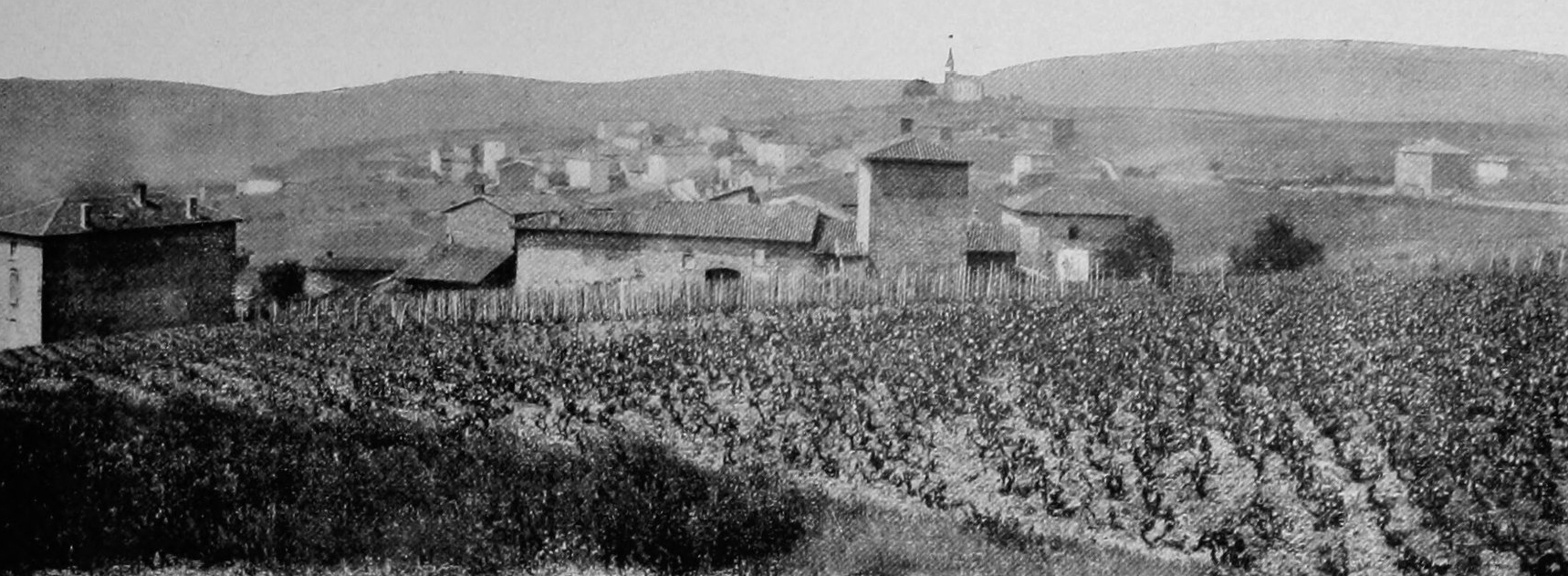 Dictionnaire illustré des communes du département du Rhône. Tome 2 / par MM. E. de Rolland et D. Clouzet.